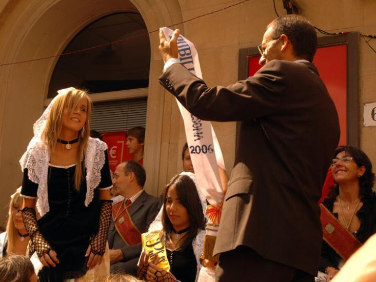 Proclamació de la Pubilla de Solsona 2006 el dia 8 de setembre de 2006 a la plaça Major d'aquesta ciutat.